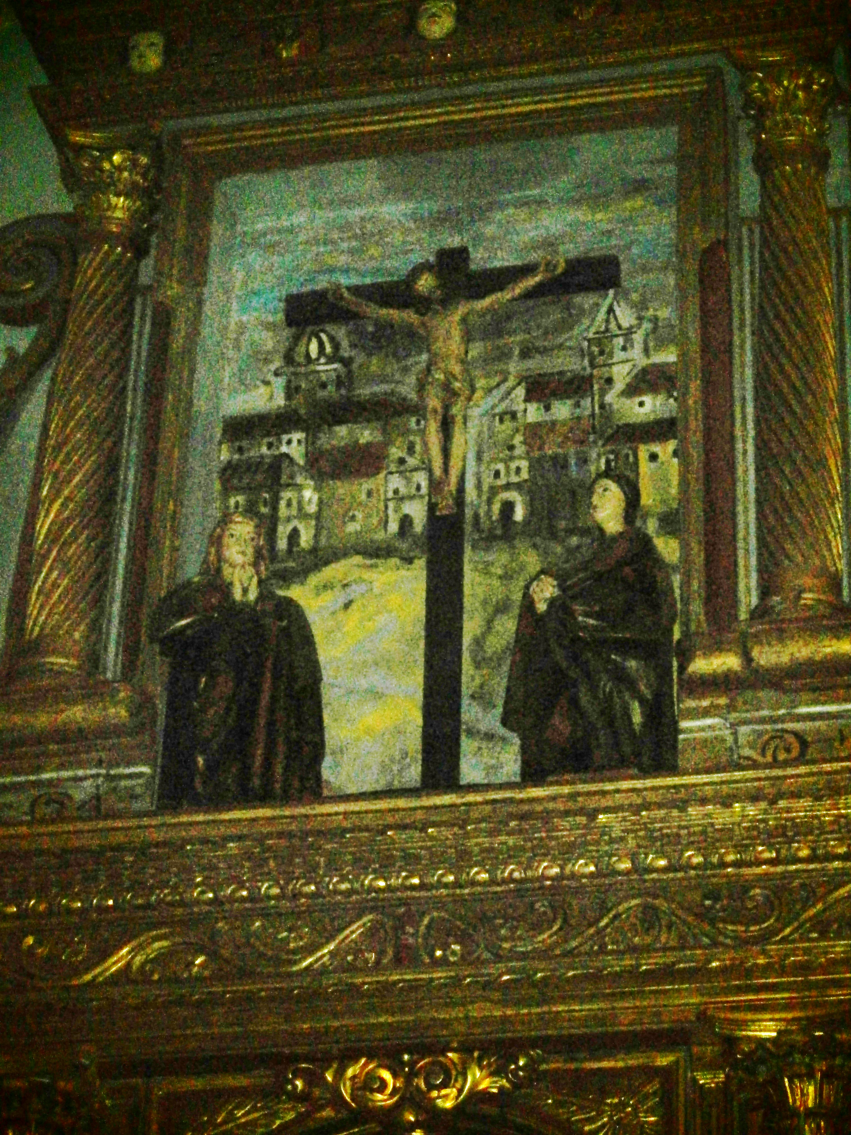 Jesús en la Cruz junto a la Virgen y San Juan coronando el altar mayor.